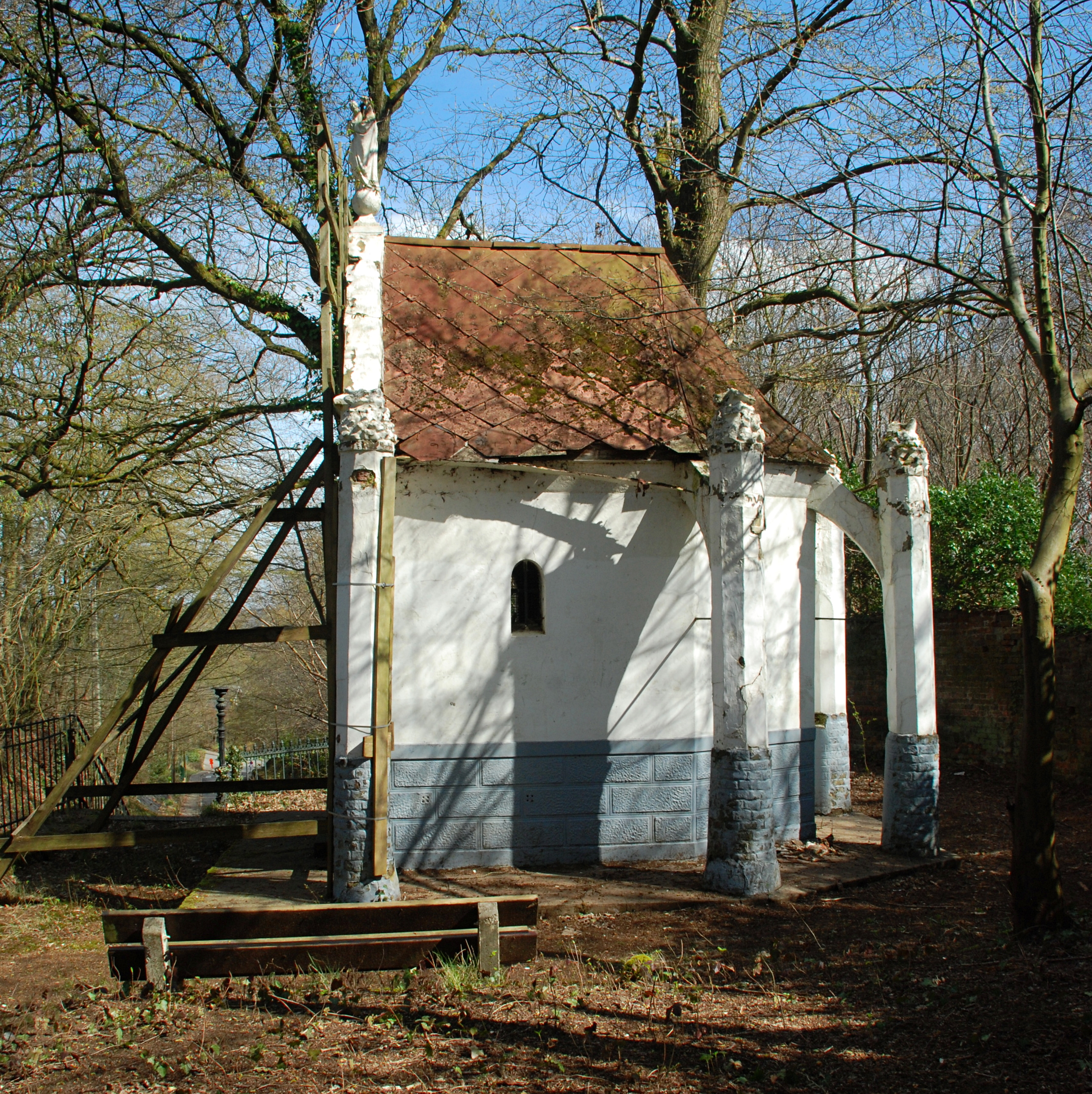 Belgique - Brabant wallon - Limal - Chapelle de Grimohaye